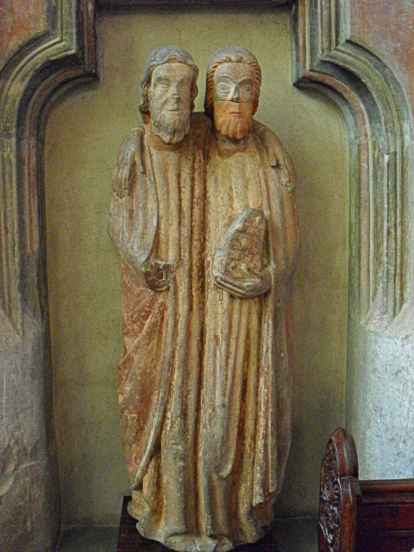 Legnica, katedra kościoła rzymskokatolickiego pw. świętych Piotra i Pawła, patroni diecezji śś. Piotr i Paweł